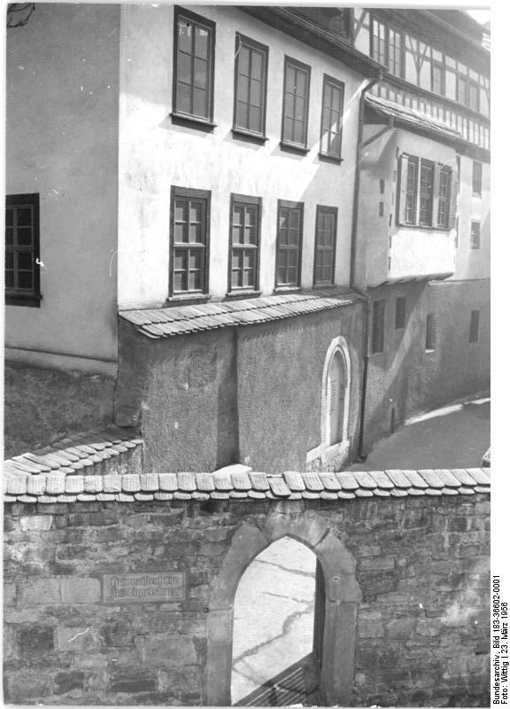 Erfurt, Allerheiligenstraße, Humanistenstätte Zentralbild Erfurt-Wittig 23.3.1956 Bn-Th. Schönes Erfurt. UBz: Blick auf den Eingang zu den Humanistenstätten in der Allerheiligenstrasse. Information added by Wikimedia users. Kirchhofsgasse, Erfurt